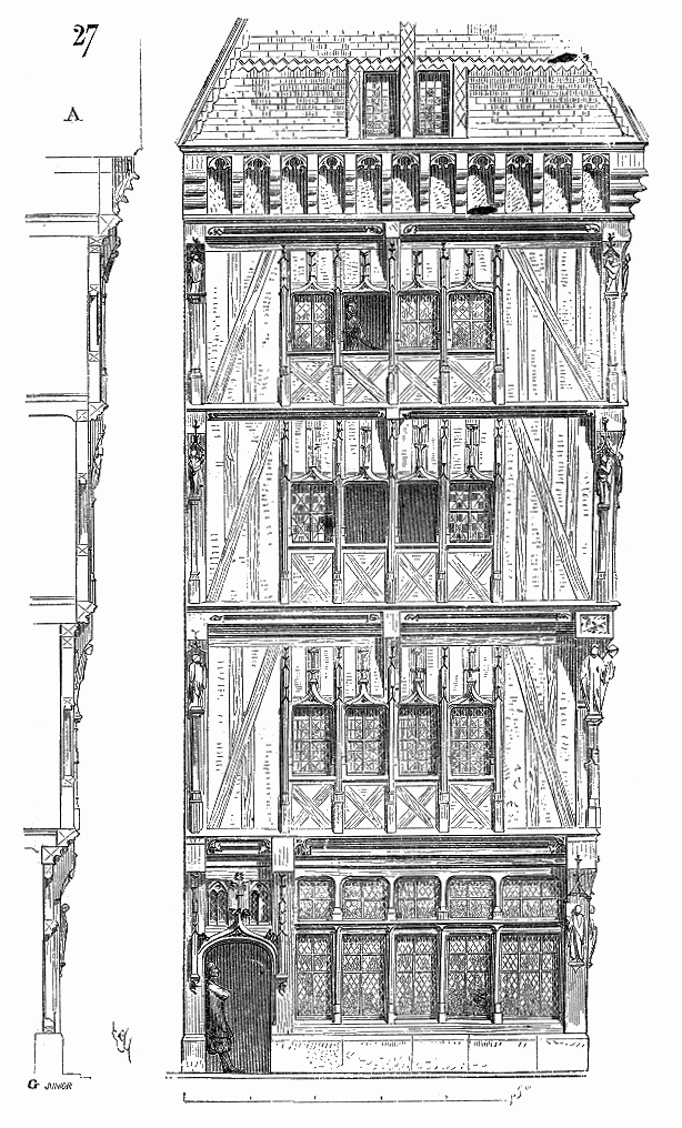 ... Voici également (27) une maison de Rouen en pan de bois, à quatre étages, un peu antérieure à la précédente, c'est-à-dire appartenant à la première moitié du XVe siècle, et qui forme angle de deux rues. Les pans de bois de chaque étage sont posés en encorbellement les uns sur les autres (voir la coupe A), de sorte que le troisième étage prend une surface sensiblement plus grande que celle occupée par le rez-de-chaussée. La corniche à la base du pignon figure une suite de mâchicoulis ...